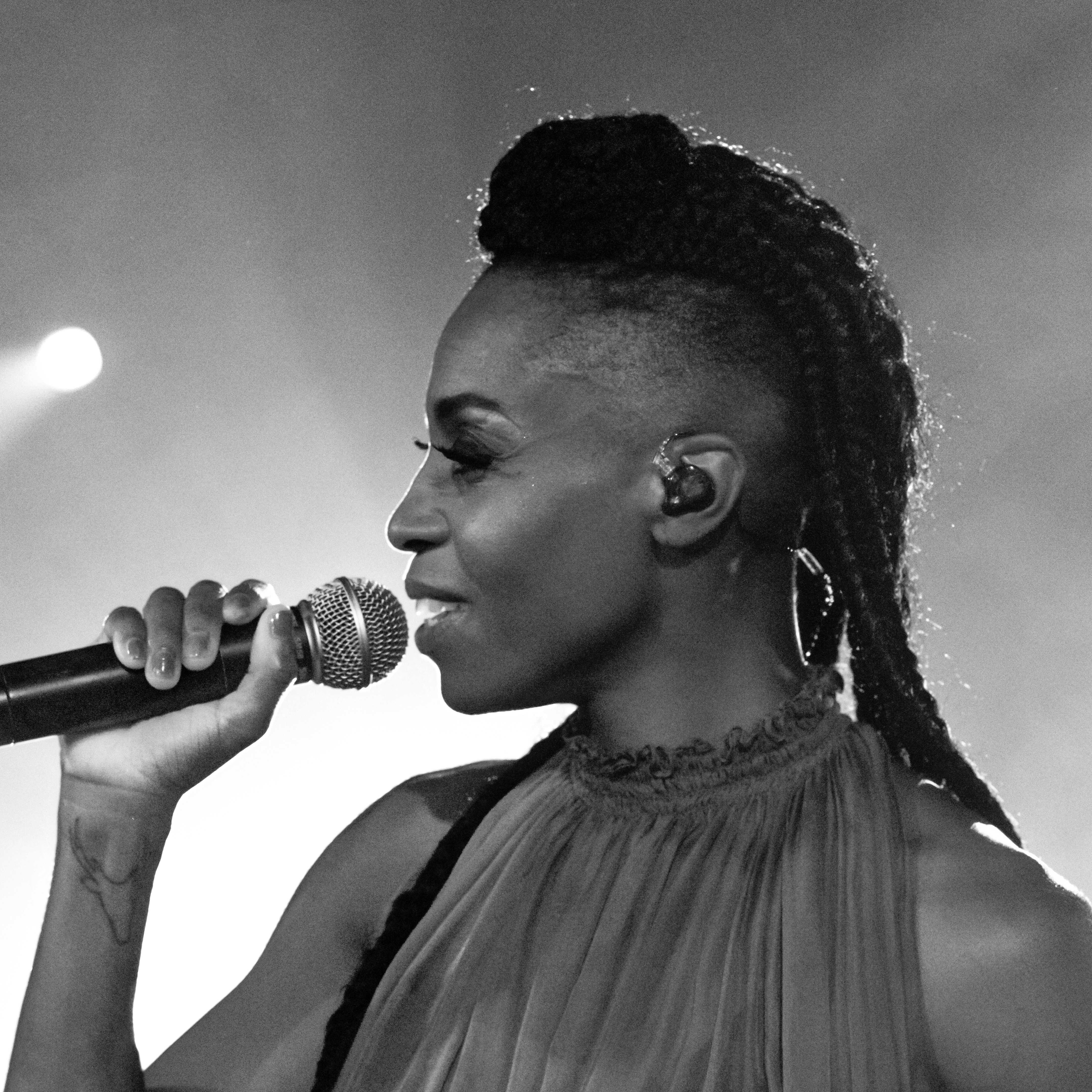 Bilder vom Zelt Musik Festival 2018 in Freiburg im Breisgau Morcheeba Auftritt am 31. Juli 2018 im Speigelzelt